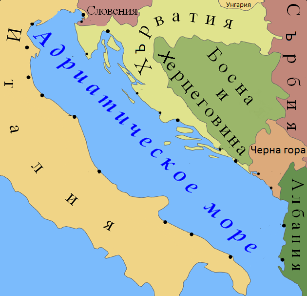 Политическа карта на Адриатическо море и държавите около него.